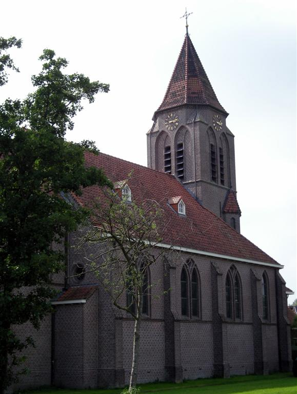 Sint-Wirokerk in Oosterwierum / Easterwierrum